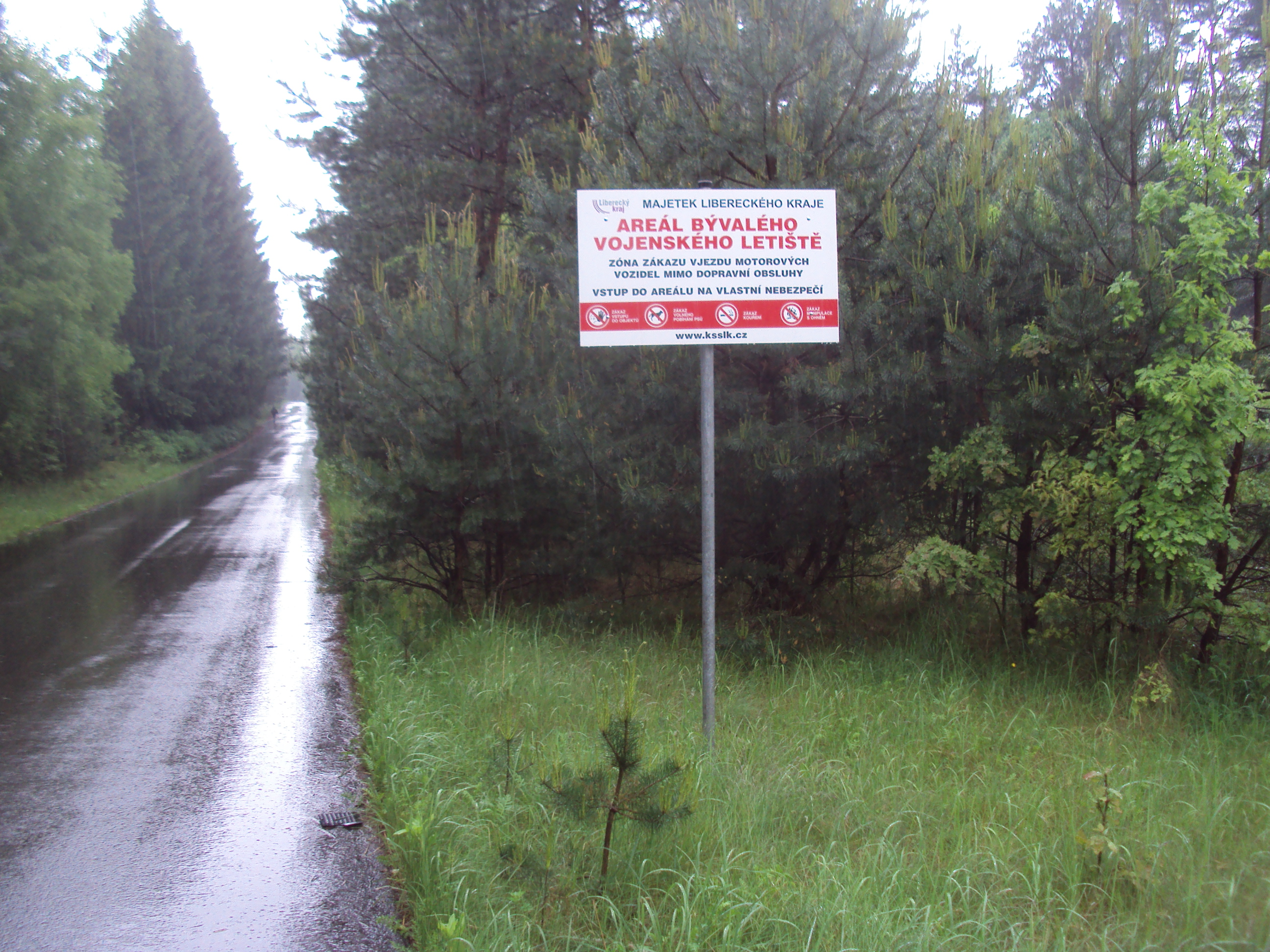 Tabule je u silničky z Ploužnice k letišti Hradčany